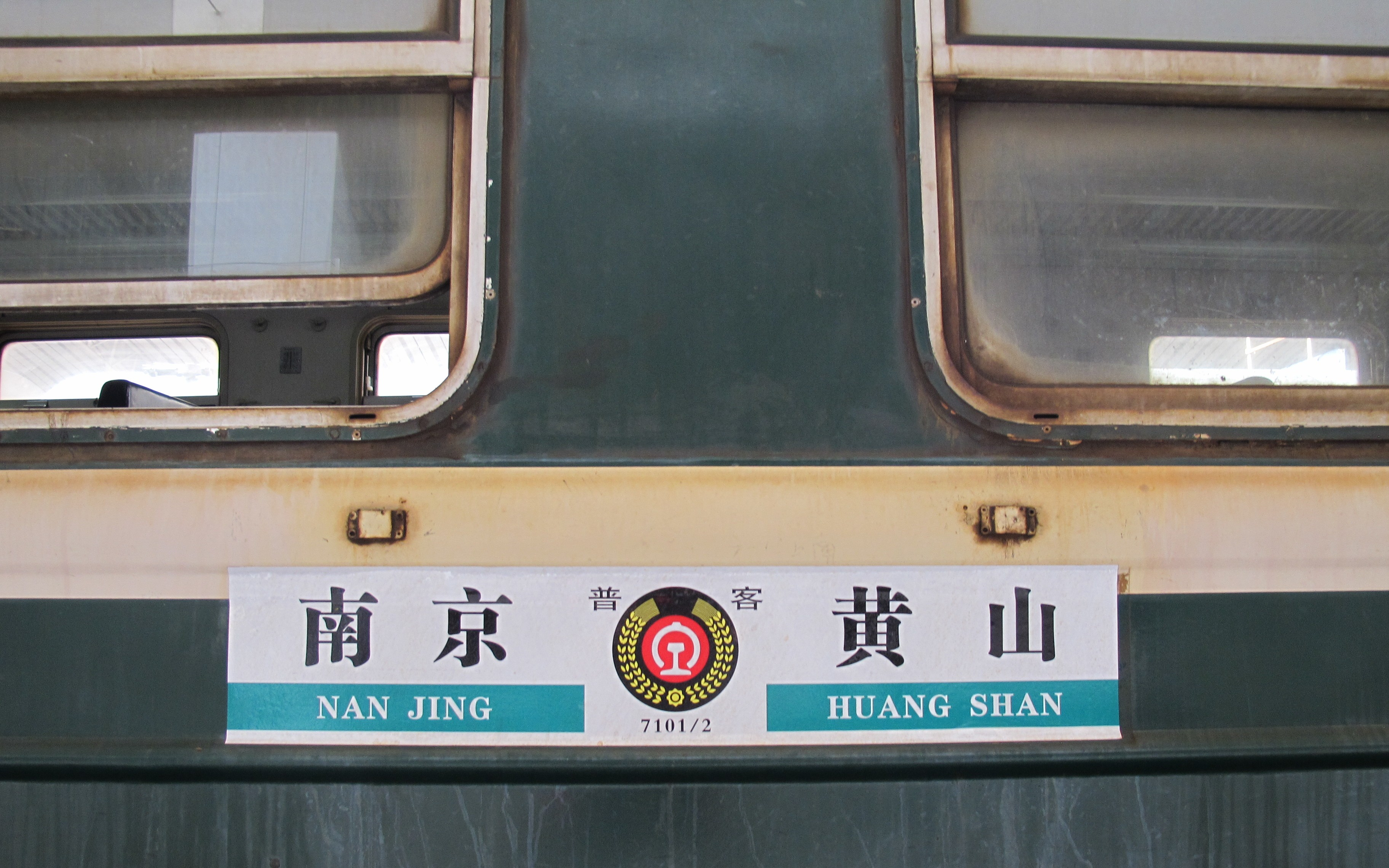 7101/7102次列车水牌。